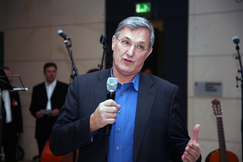 Geburtstagsempfang zum 65. von Gregor Gysi im Reichstagsgebäude